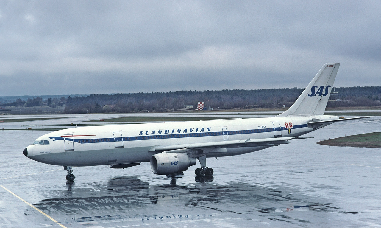 SAS Airbus A300B4-120